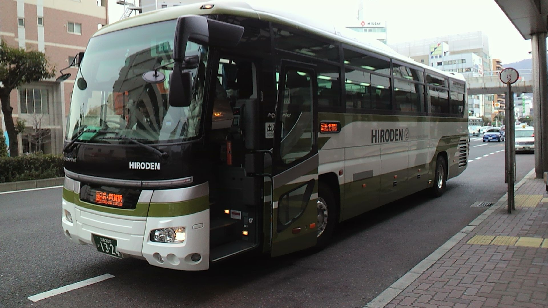 クレアライン＠呉駅前